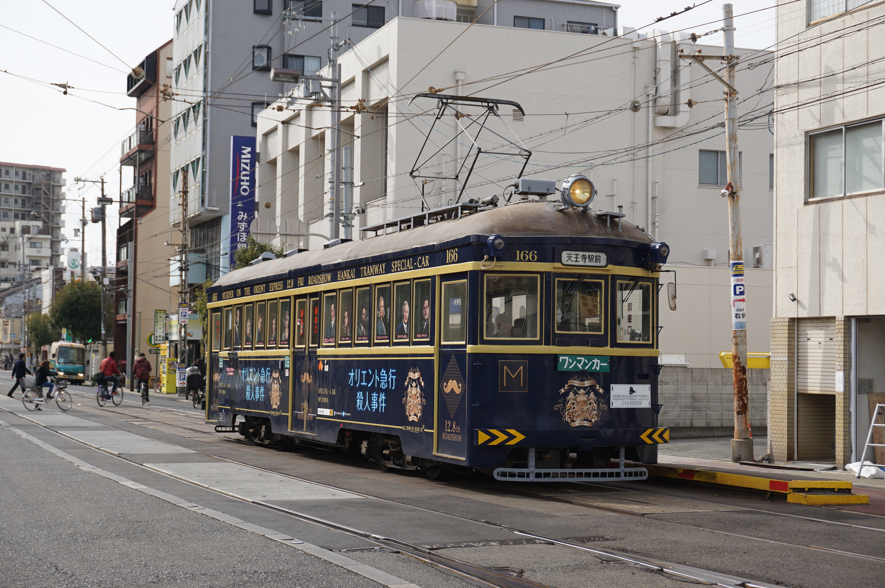 オリエント・エクスプレス殺人事件の広告電車となった166号車 Sony ILCE-6000